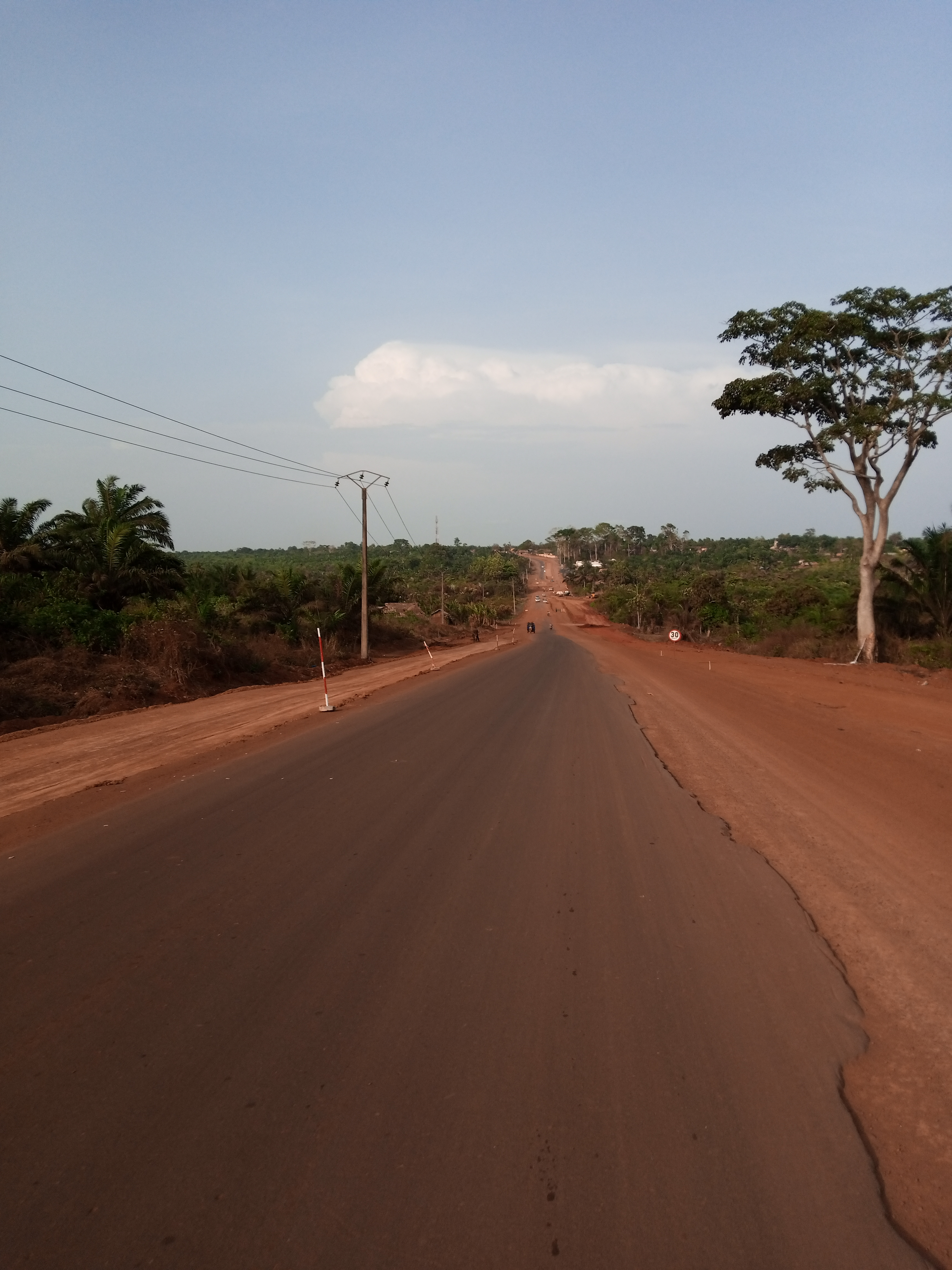 voie Porto-Novo vers Takon This is an image with the theme "Africa on the Move or Transport" from: Benin